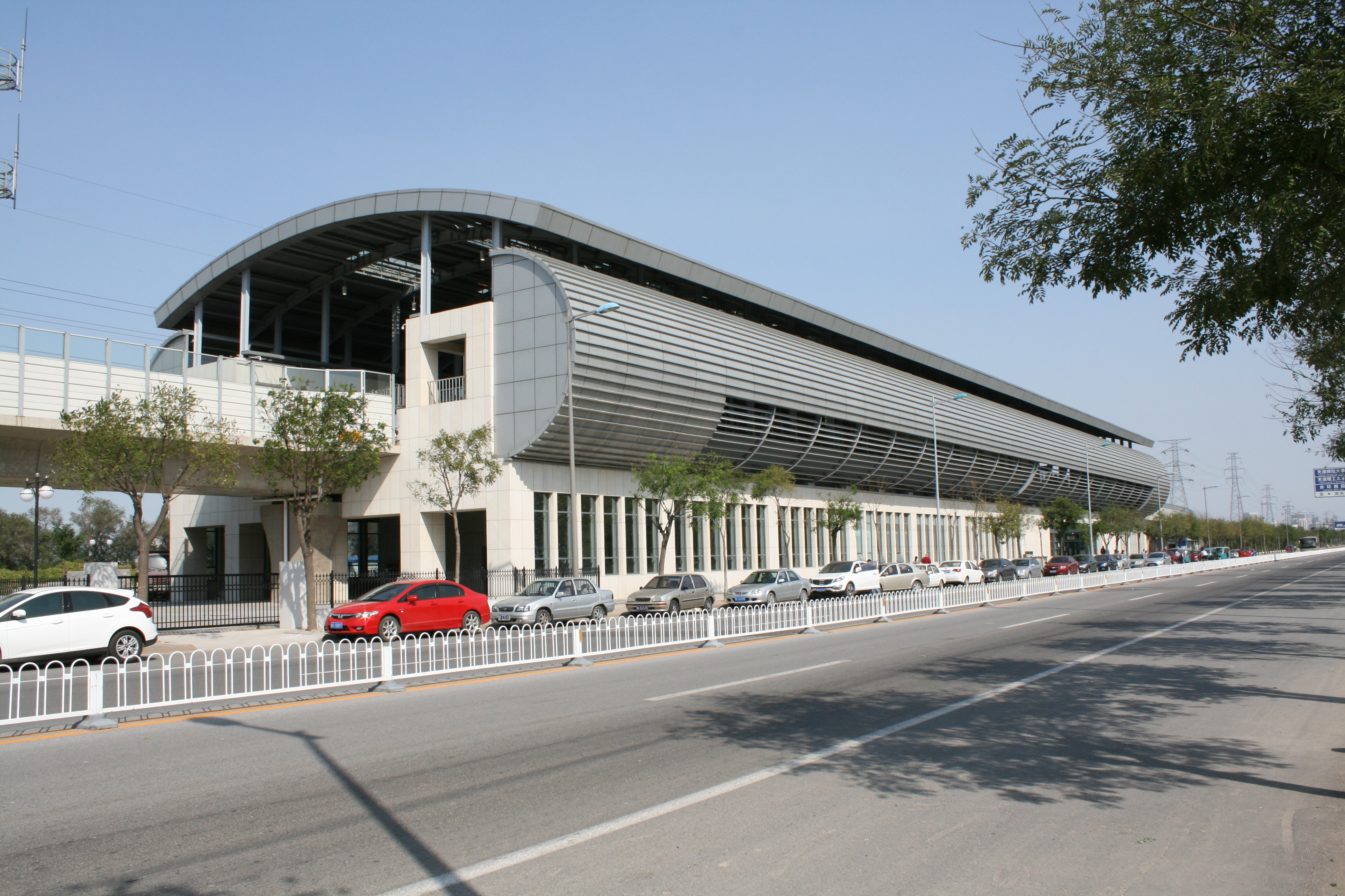 天津地鐵大學城站站體 0001